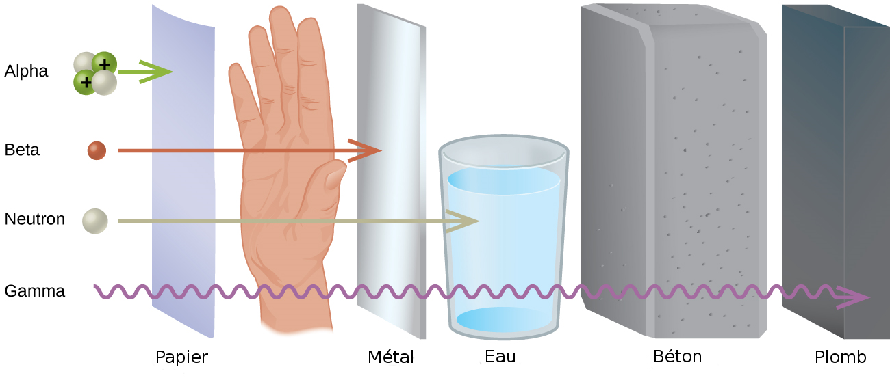 Pénétration des rayons ionisants à travers différents matériaux.